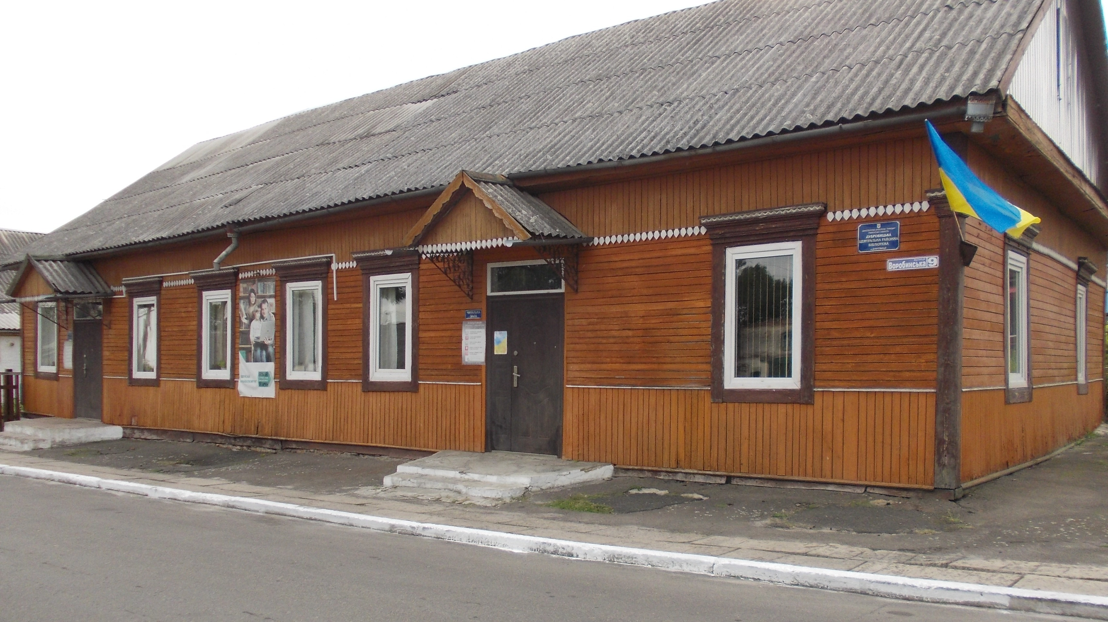 Сучасний стан бібліотеки